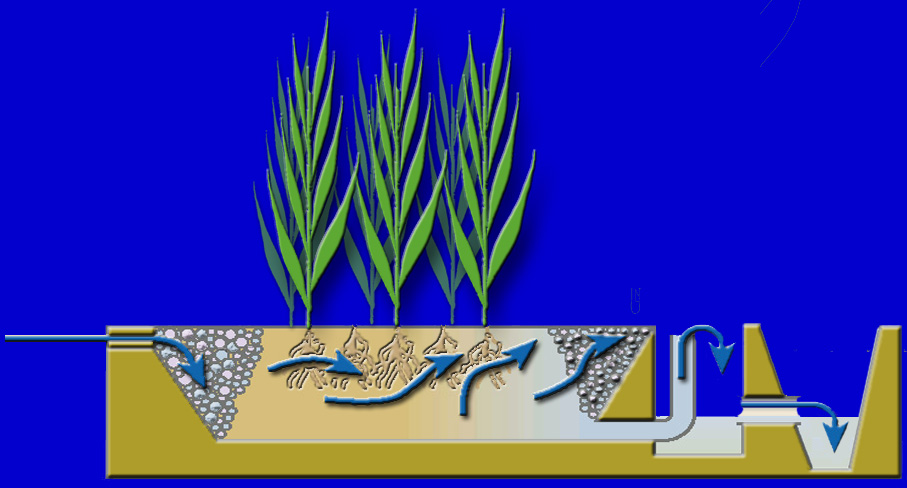 schéma illustrant le principe du lagunage naturel